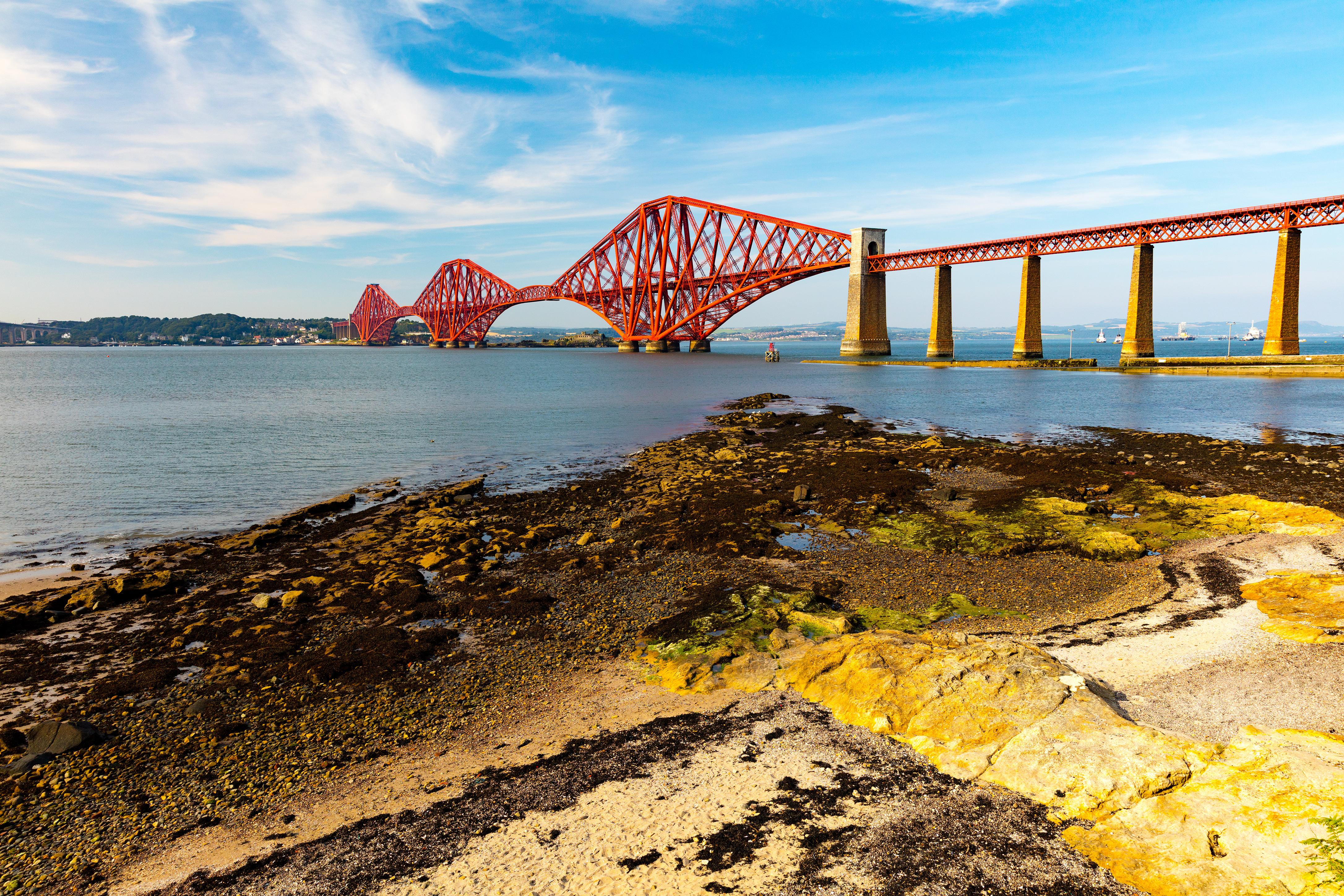 Forth Bridge August 2016 - South Queensferry Beach